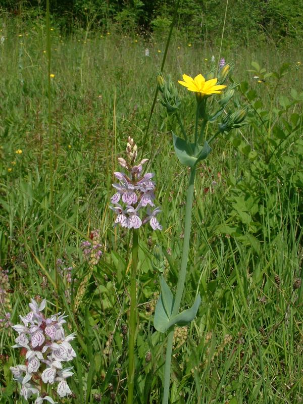 Blackstonie perfoliée Blackstonia perfoliata avec Dactylorhiza maculata sur pelouse marneuse hygrophile, Bucey-lès-Gy, photo J. F. Gaffard, juin 2004